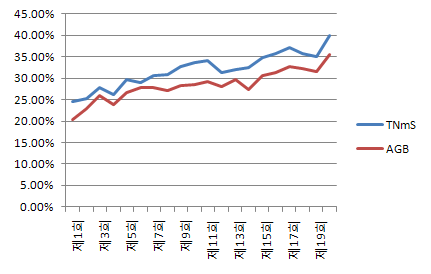 KBS 2TV의 드라마 아이리스의 시청률 추이